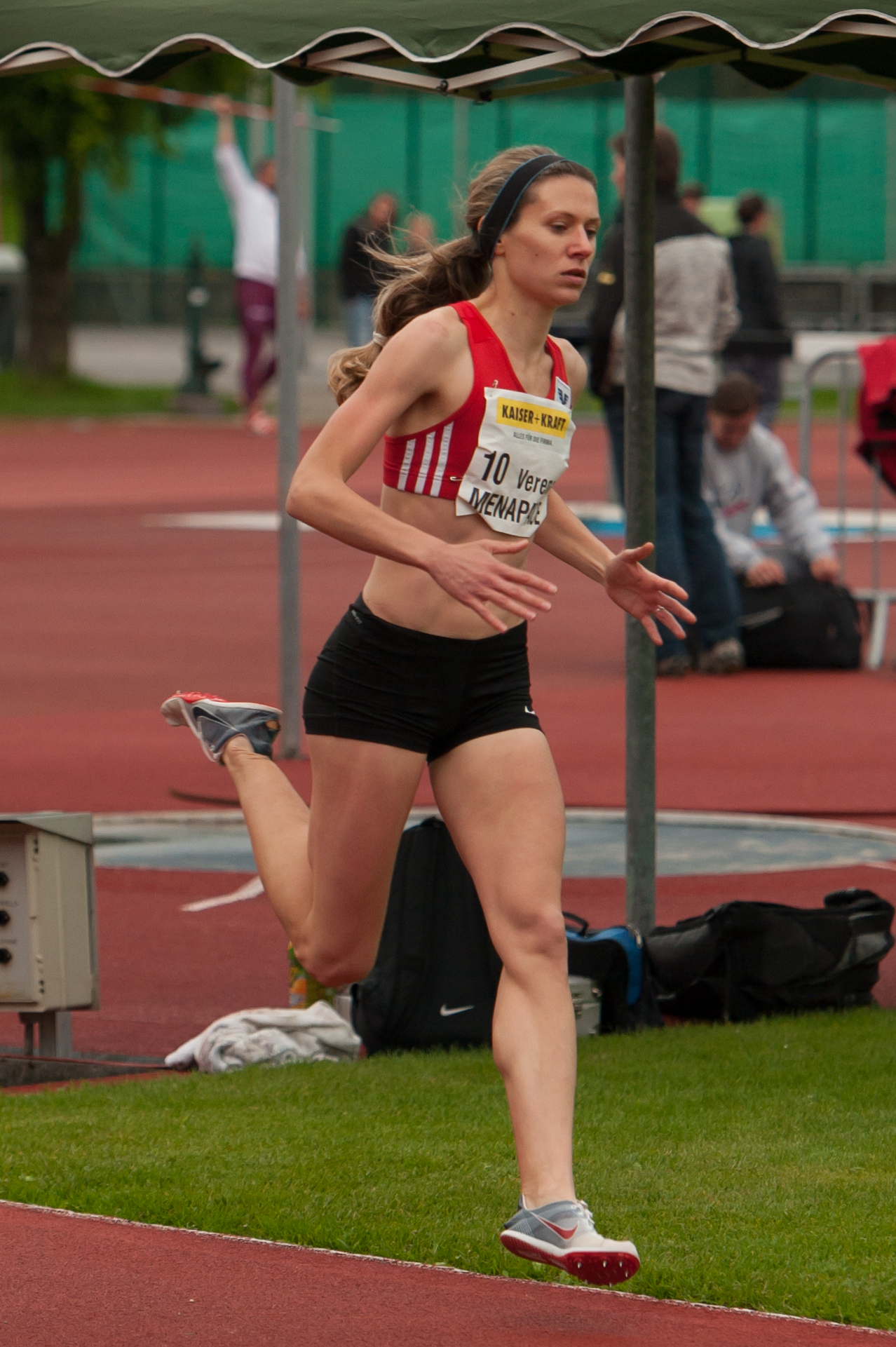 Salzburger Leichtathletik Gala am 27. Mai 2015: Verena Menapace